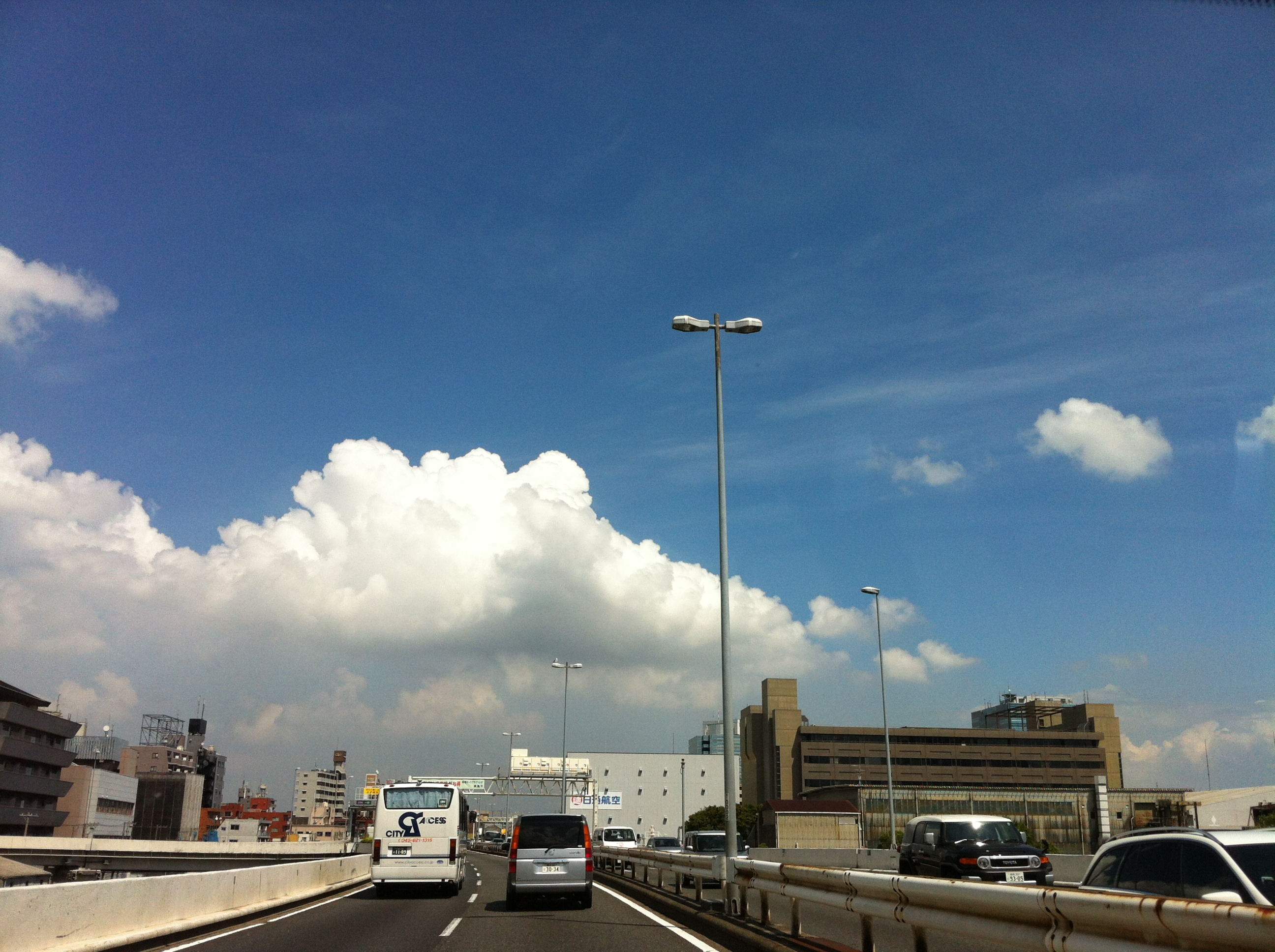 1 Chome Chiwakachō, Kanagawa-ku, Yokohama-shi, Kanagawa-ken 221-0036, Japan